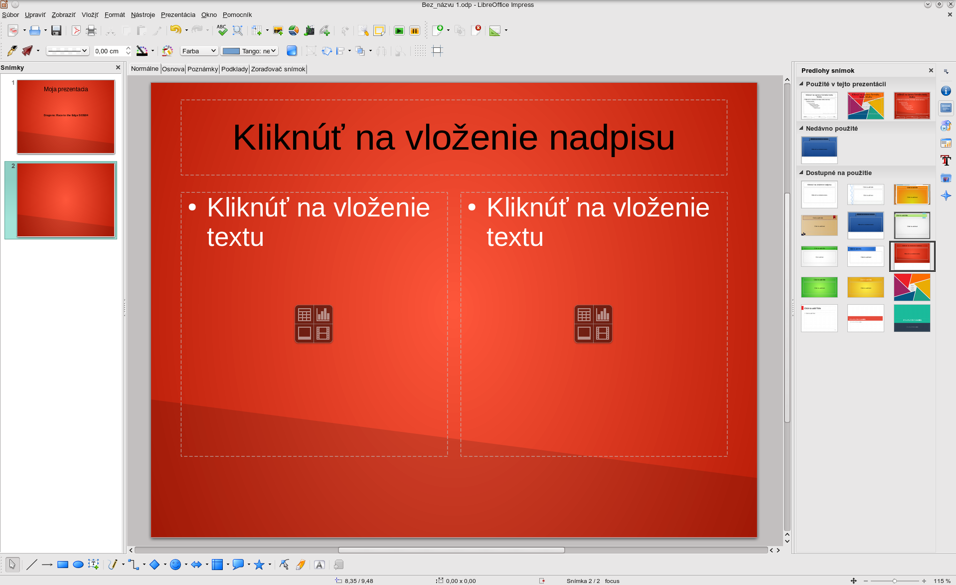 LibreOffice Prezentácia